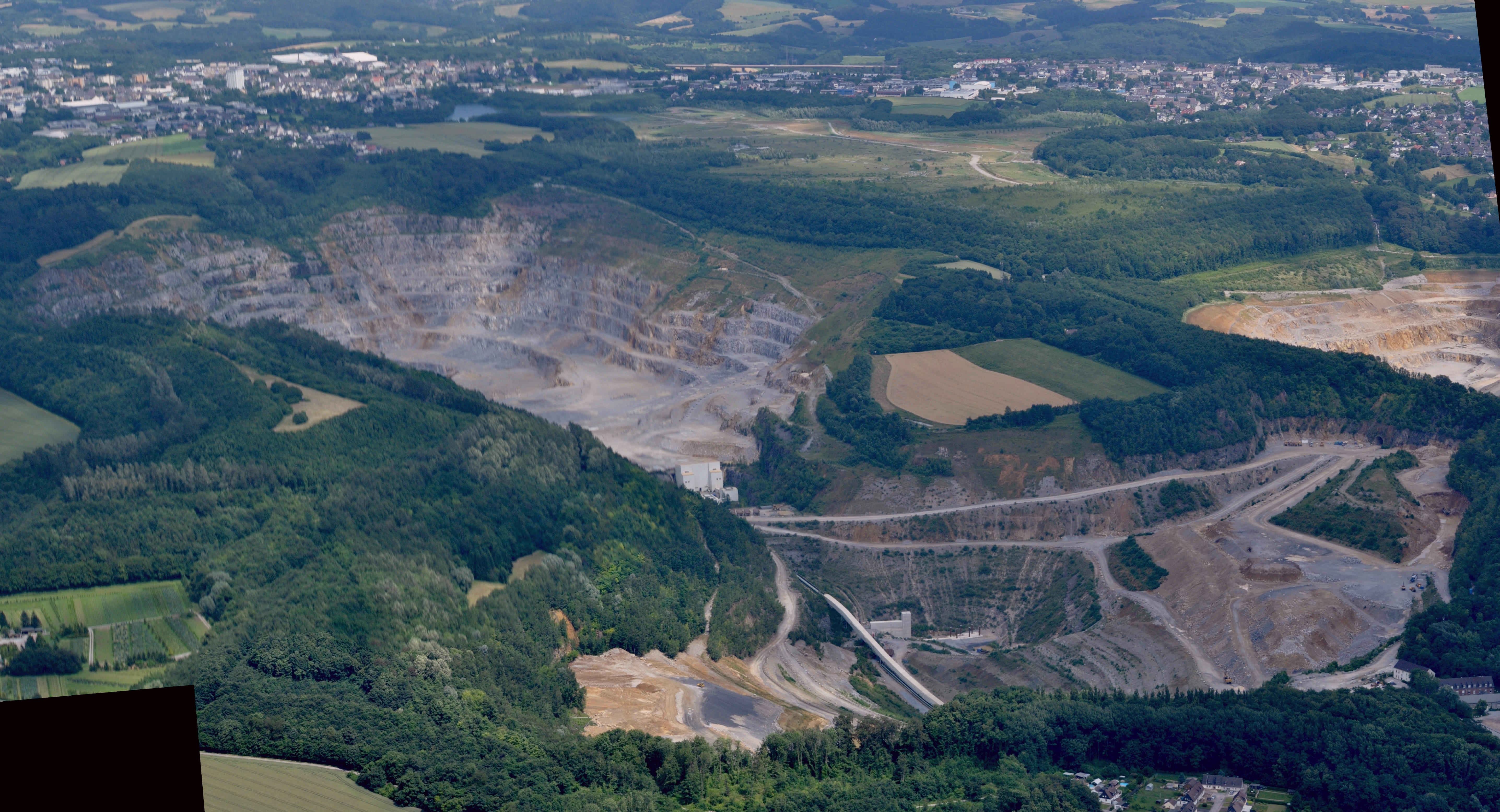 Grube Rohdenhausen des Kalkwerks in Wülfrath, Germany